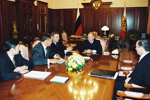 МОСКВА, КРЕМЛЬ. Совещание по вопросам восстановительных работ на Останкинской телебашне. Слева направо: Министр по связи и информатизации Леонид Рейман, Министр по делам печати, телерадиовещания и средств массовых коммуникаций Михаил Лесин, Председатель Правительства Михаил Касьянов и председатель Государственного комитета по строительству и жилищно-коммунальному комплексу Анвар Шамузафаров.